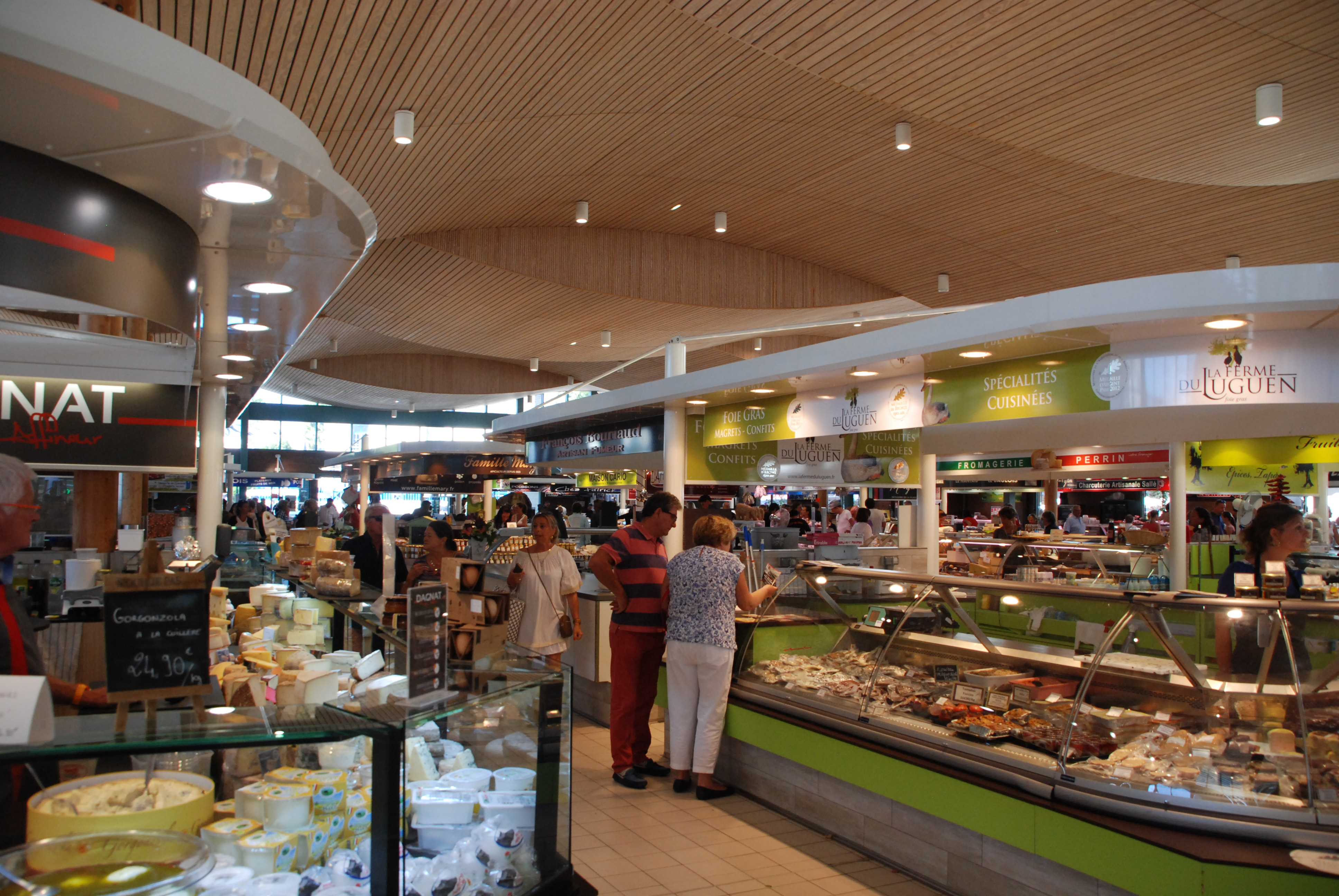 Les halles de La Baule-Escoublac